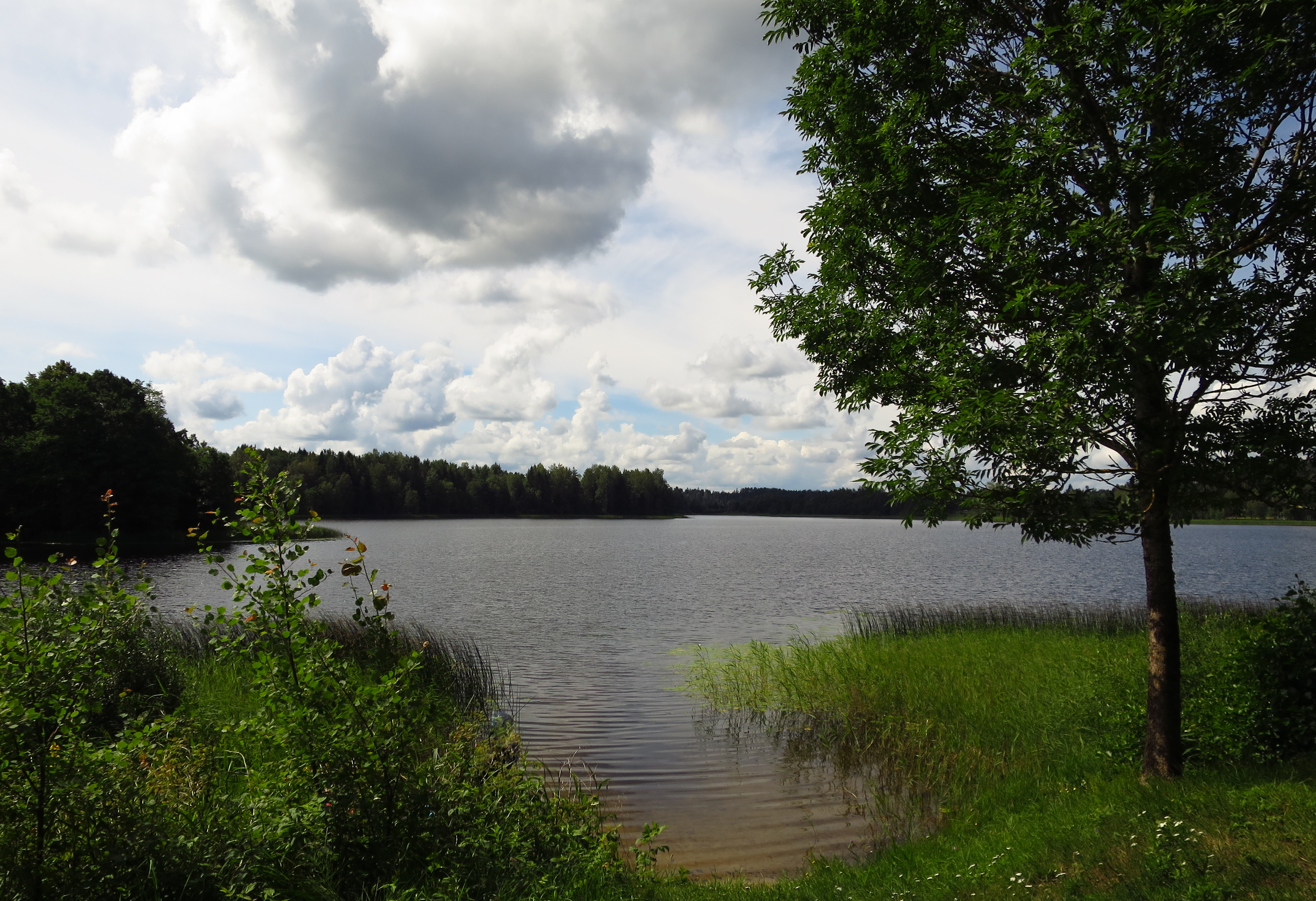 Kooraste Suurjärv